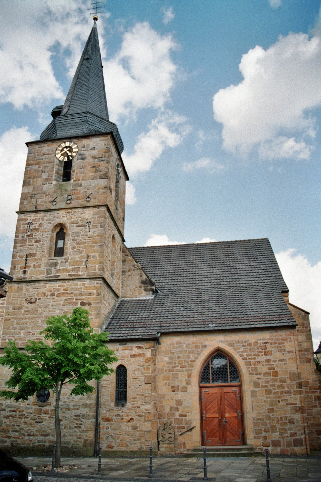 Katholische St.-Marien-Kirche Bevergern, Nordrhein-Westfalen, Deutschland.